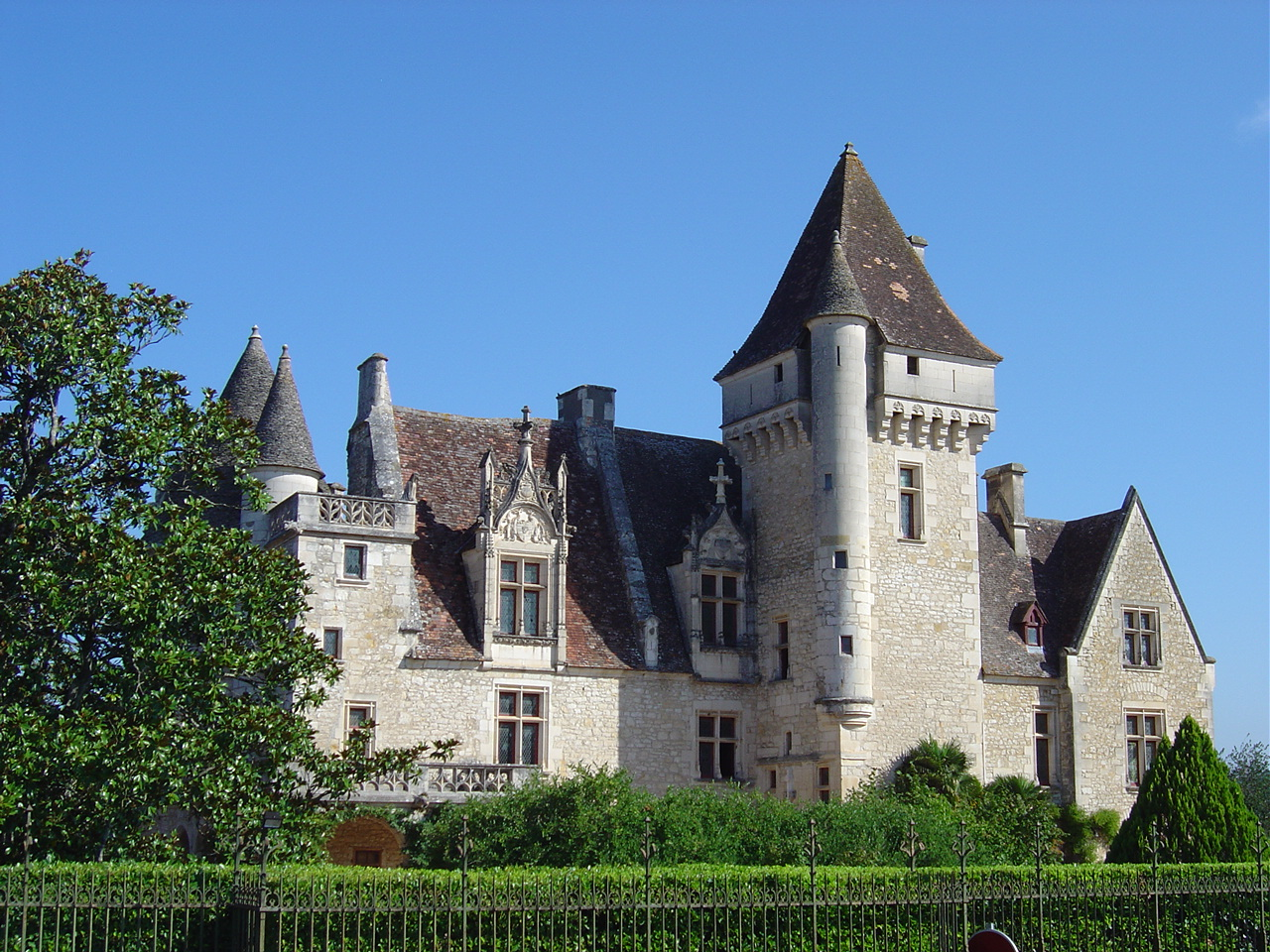 Château des Milandes (Dordogne - France)